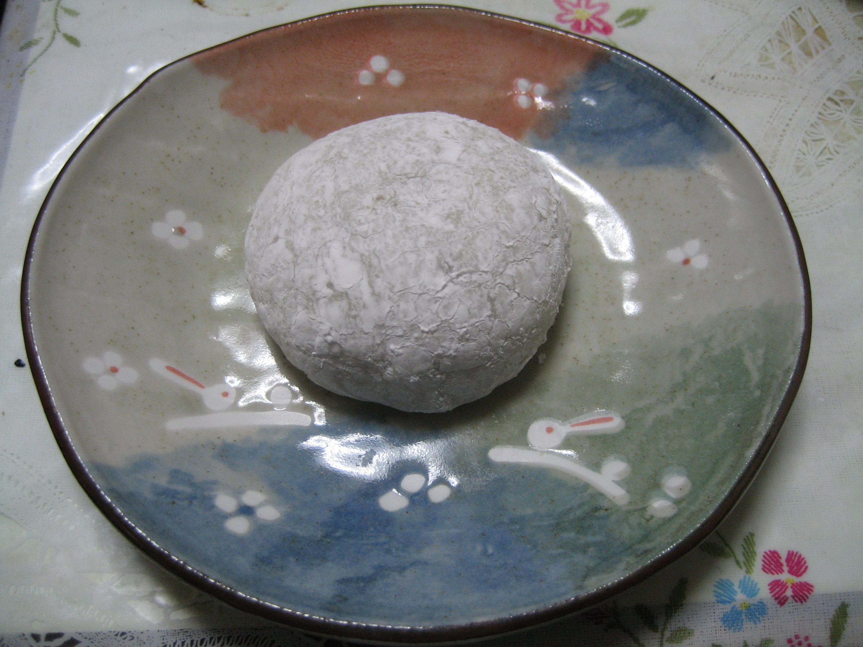 塩あんびん（外観のみ撮影）